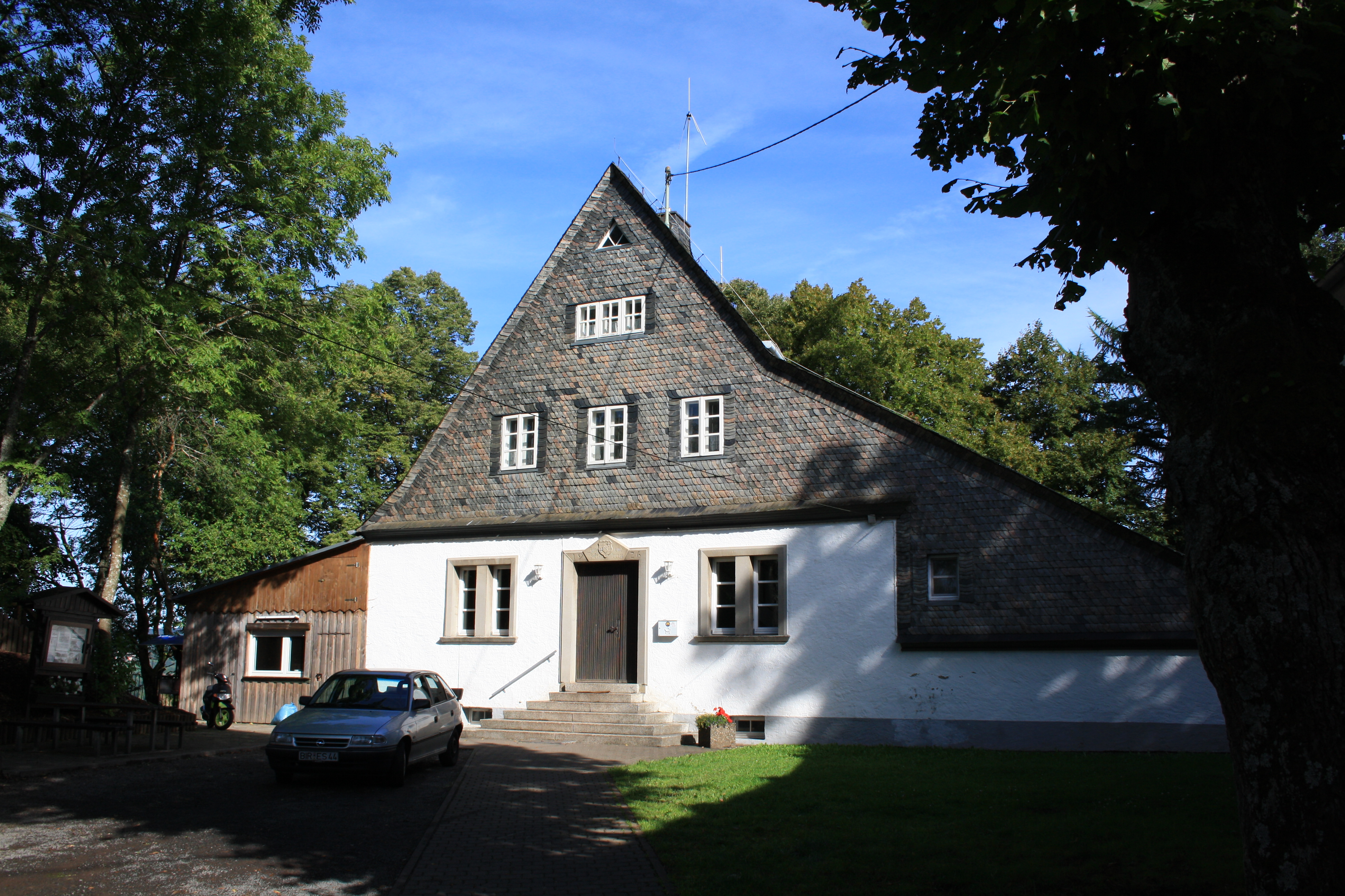 Ehemalige Jugendherberge in Birkenfeld (Nahe). Auf dem Gelände der Burg errichtet über den Grundmauern des früheren Pfarrhauses.